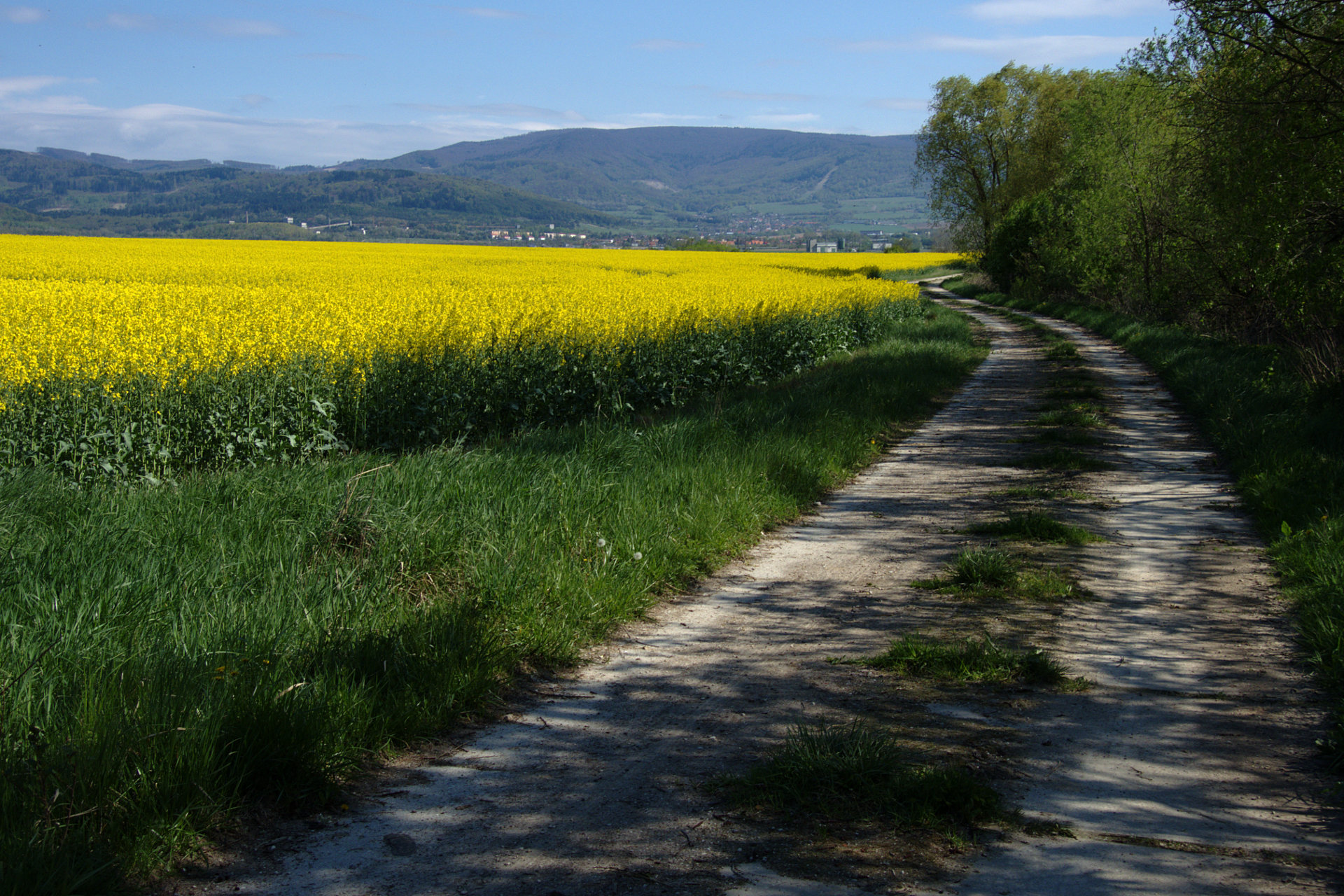 972 41 Koš, Slovakia